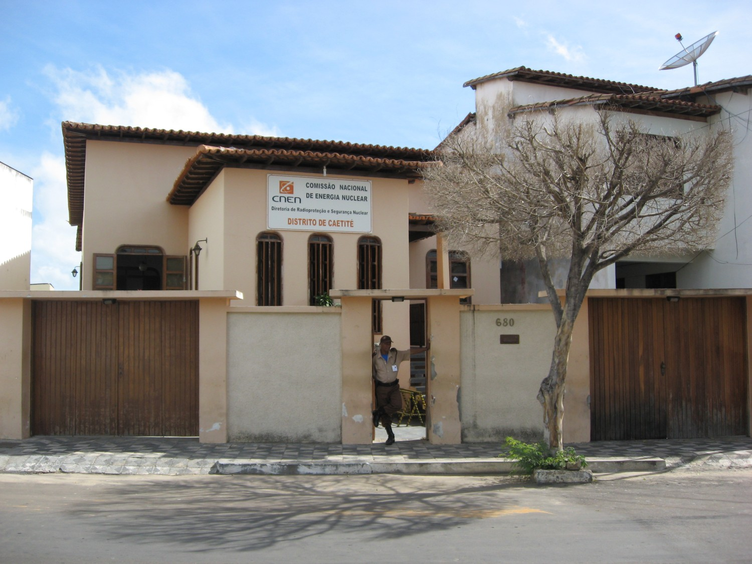 pt: Comissão Nacional de Energia Nuclear: agência de Caetité, 2008.